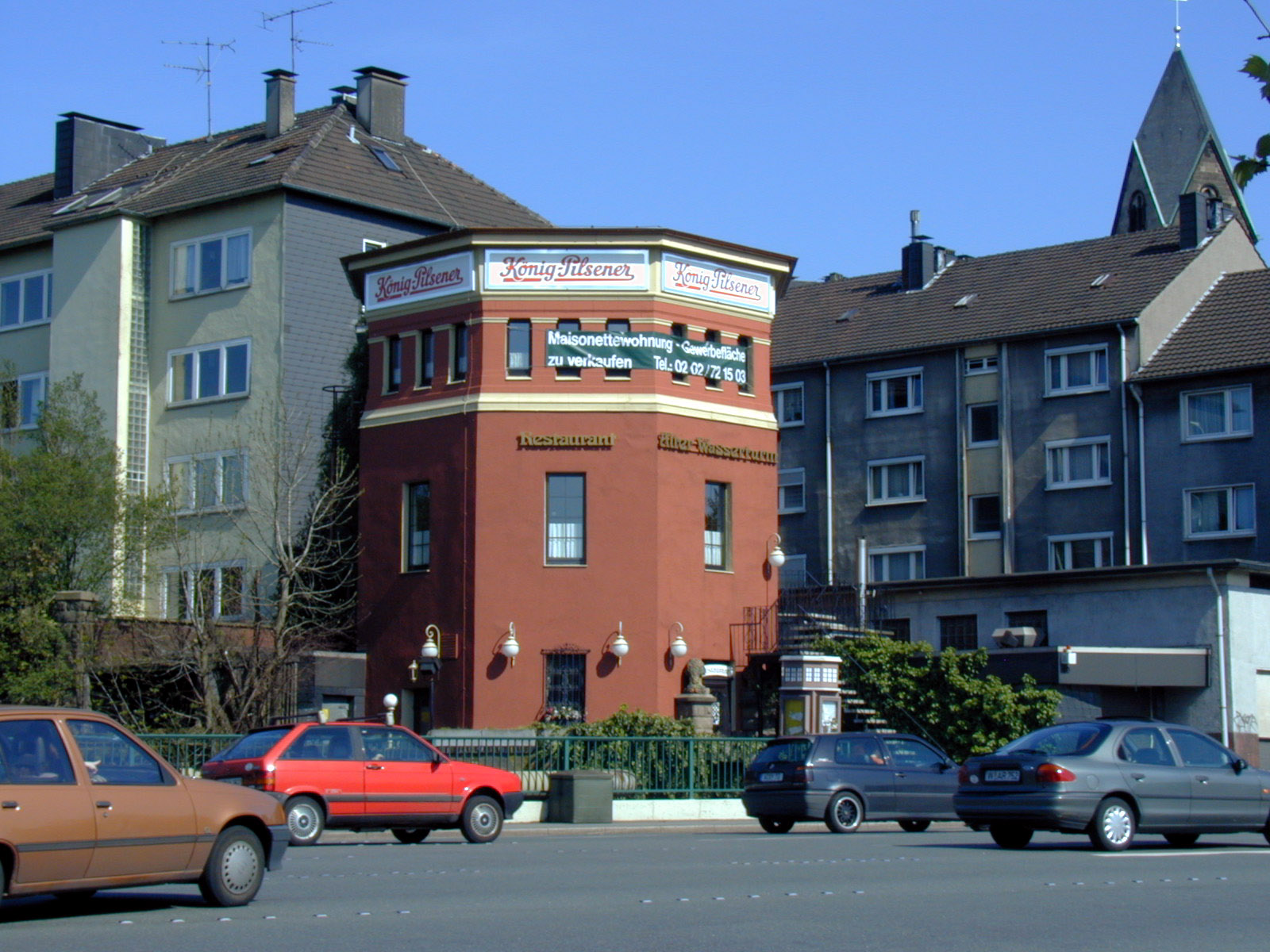 Wasserturm des Steinbecker Bahnhofs in Wuppertal